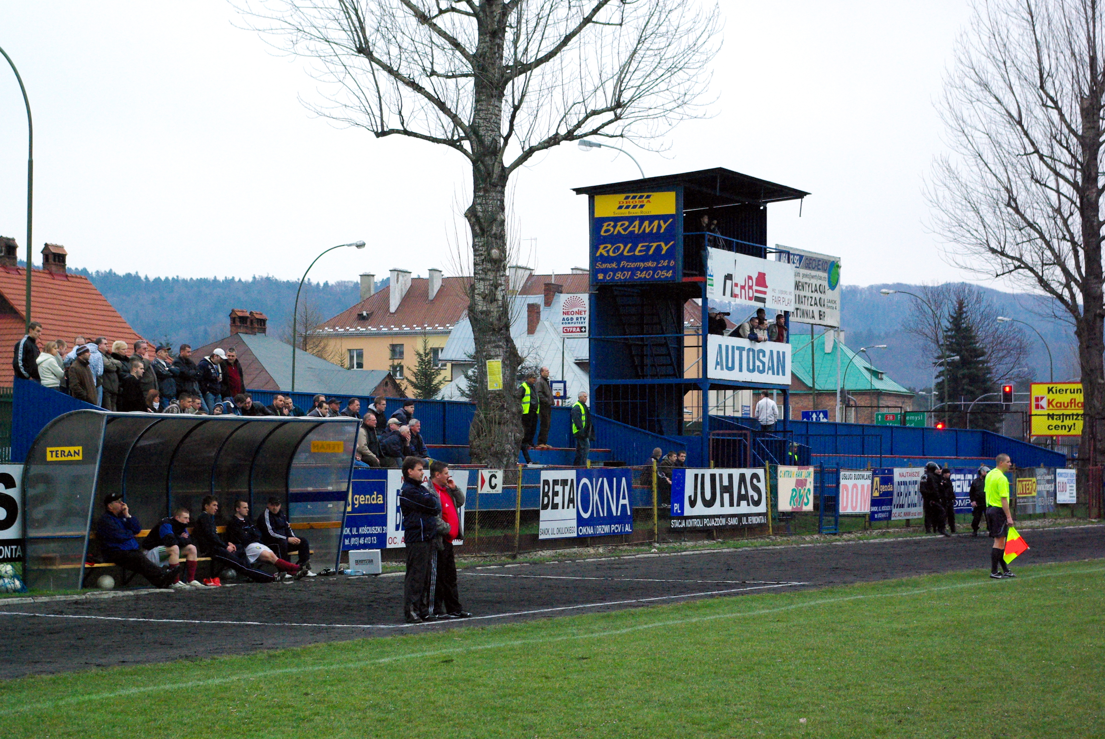 Stal Sanok - Stal Mielec 03.2008 ławki rezerwowych